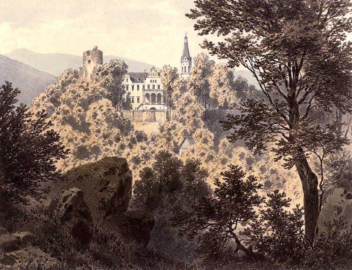 Wilhelmsburg, Kreis Bolkenhain Amtsbezirk Nimmersath (Nimmersatt), Lithographie von Alexander Duncker